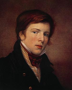 Self-portrait